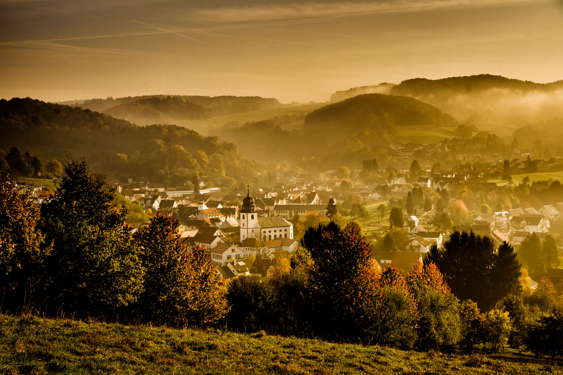 Rechts hinter der Kirche die Felsenmeerschule. In der bewaldeten Bergkuppe in der rechten Bildhälfte befindet sich der Kletterfelsen "Hohenstein". Die Aufnahme entstand im November 2014.